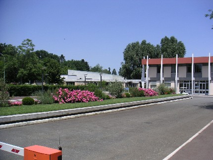 École nationale de l'aviation civile Einfahrt der ENAC